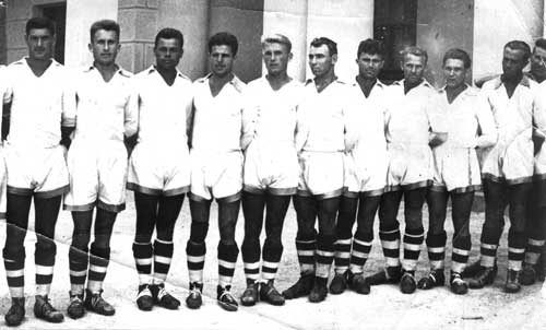 «Динамо» (Одеса), 1936 рік: Одеські динамівці перед початком першого чемпіонату СССР з футболу. Зліва направо: С. Литвачук, І. Сосицький, К. Кусинський, П. Калашніков, Н. Хіжников, Н. Кравченко, М. Хейсон, М. Гичкин, Л. Орєхов, А. Штрауб, М. Волін.